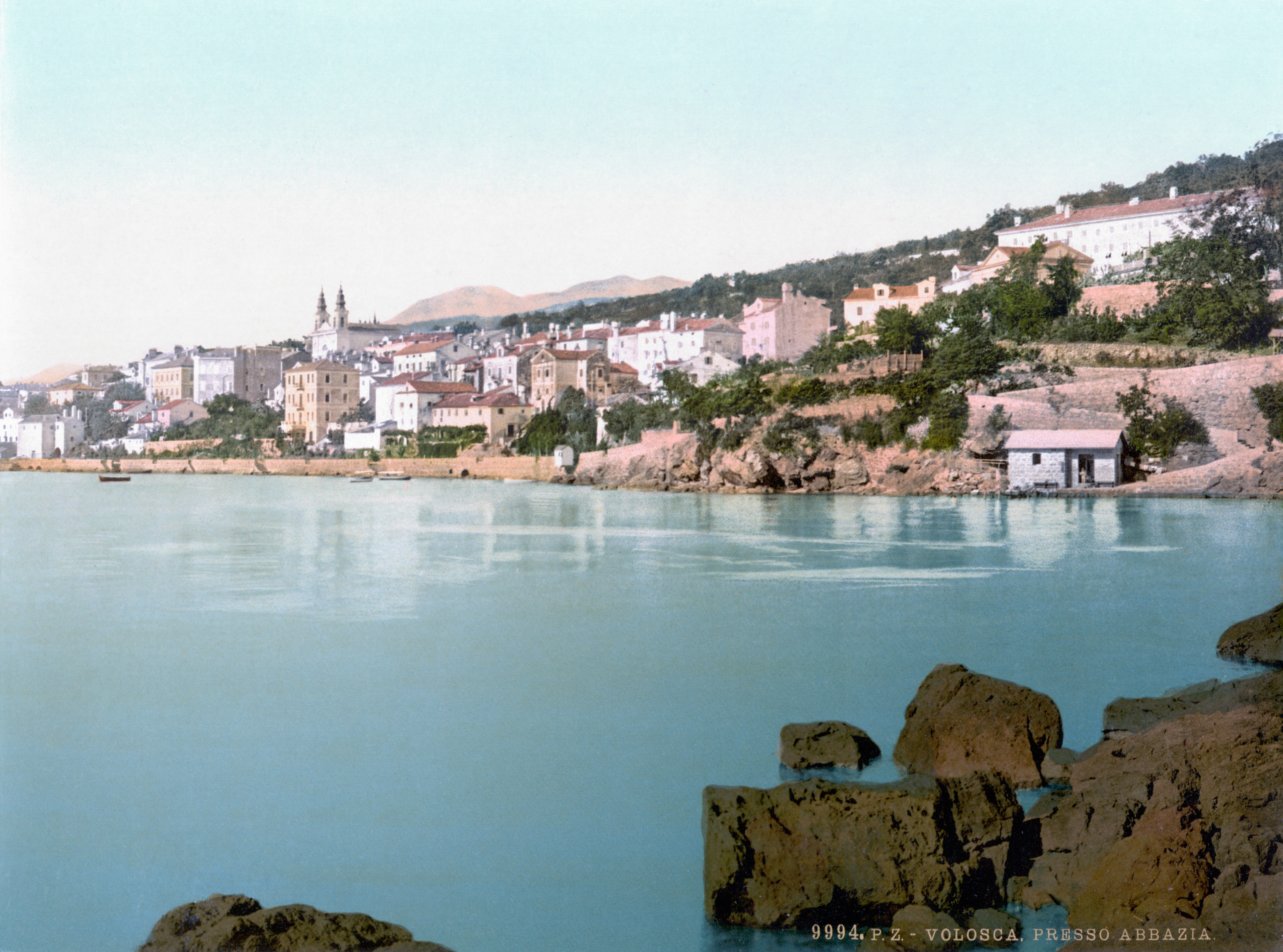 Volosca um 1900